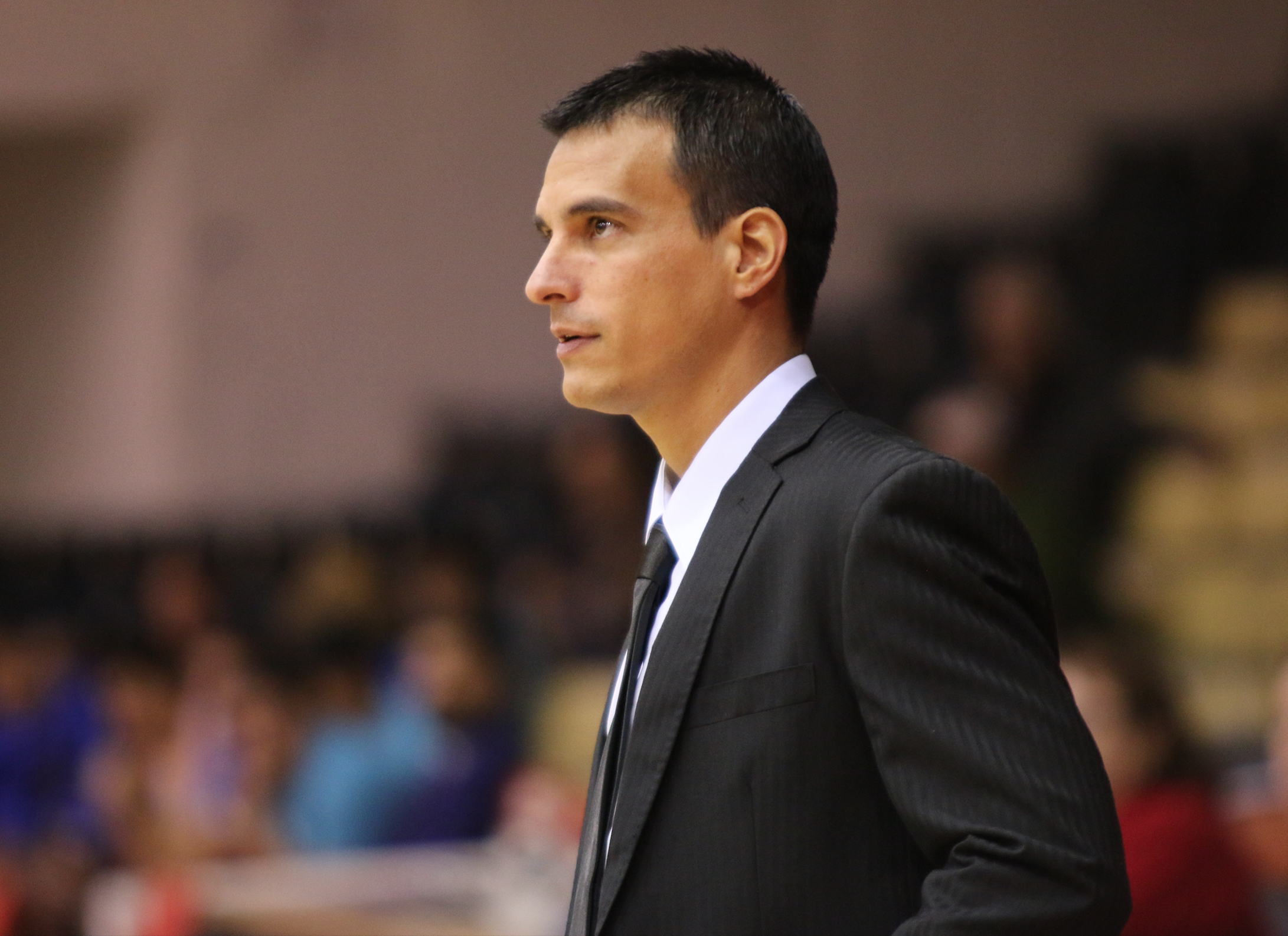 Lucas Zurita, entrenador argentino.